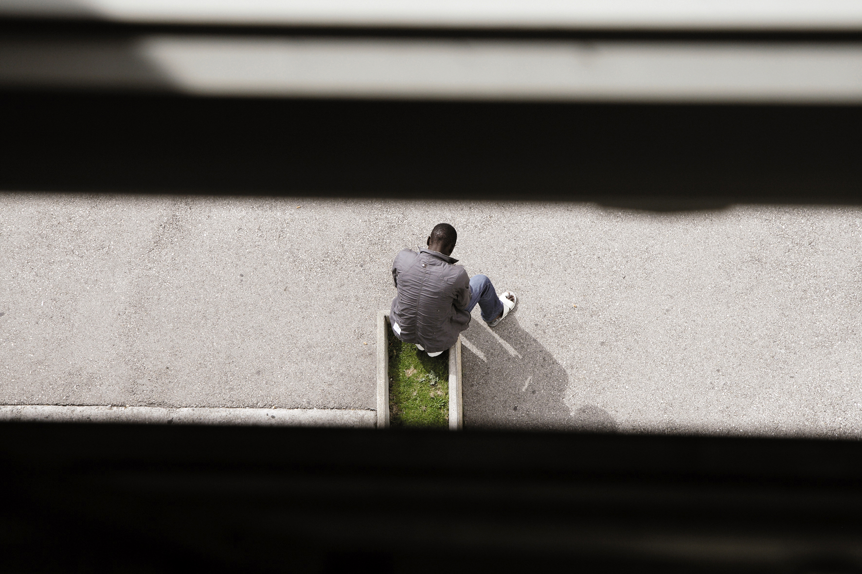 Attente dans la cour du centre d’enregistrement et de procédure pour requérant d’asile de Vallorbe. Image tirée du film « La forteresse » de Fernand Melgar